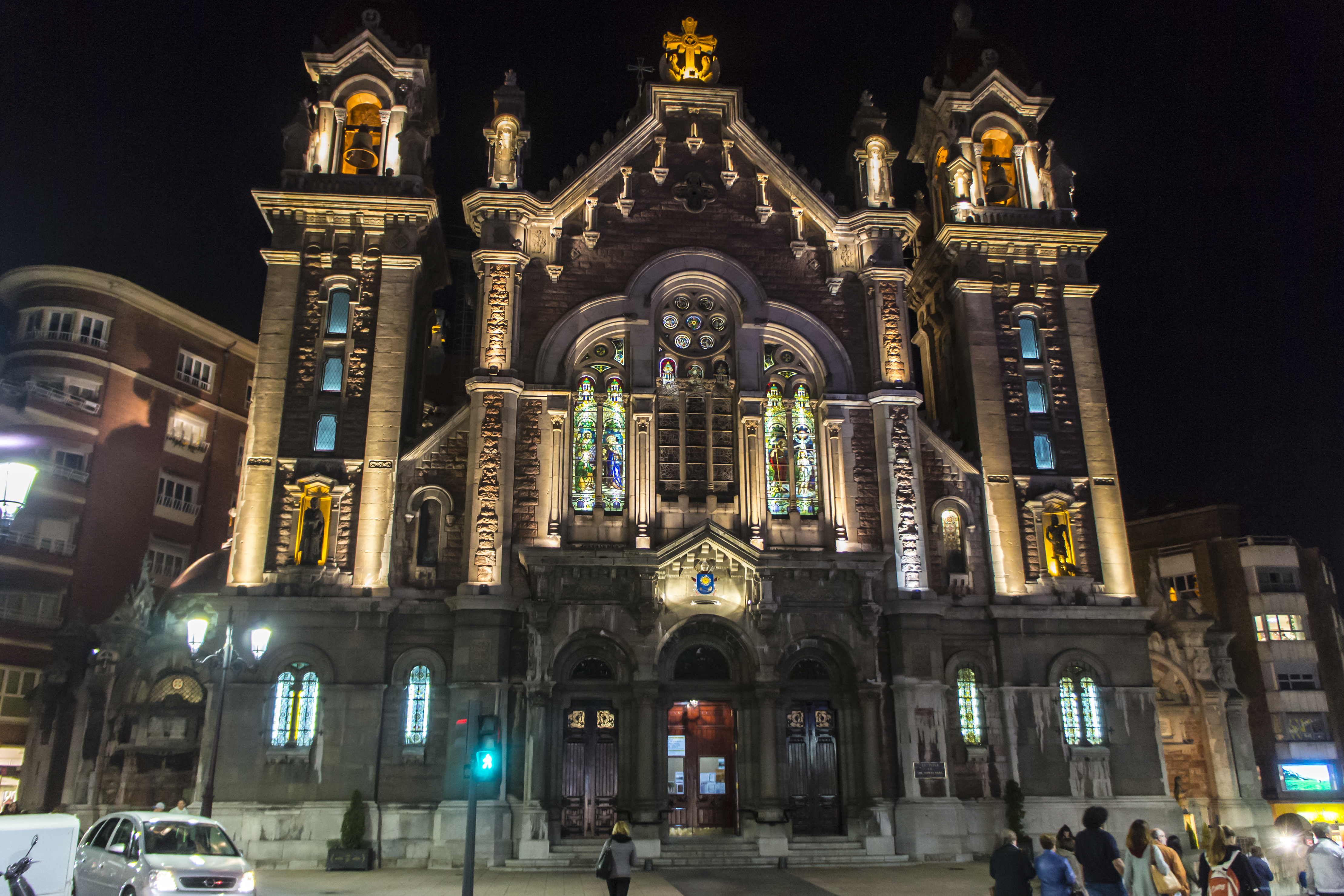 Ilesia de San Juan el Real de nueche - Uviéu